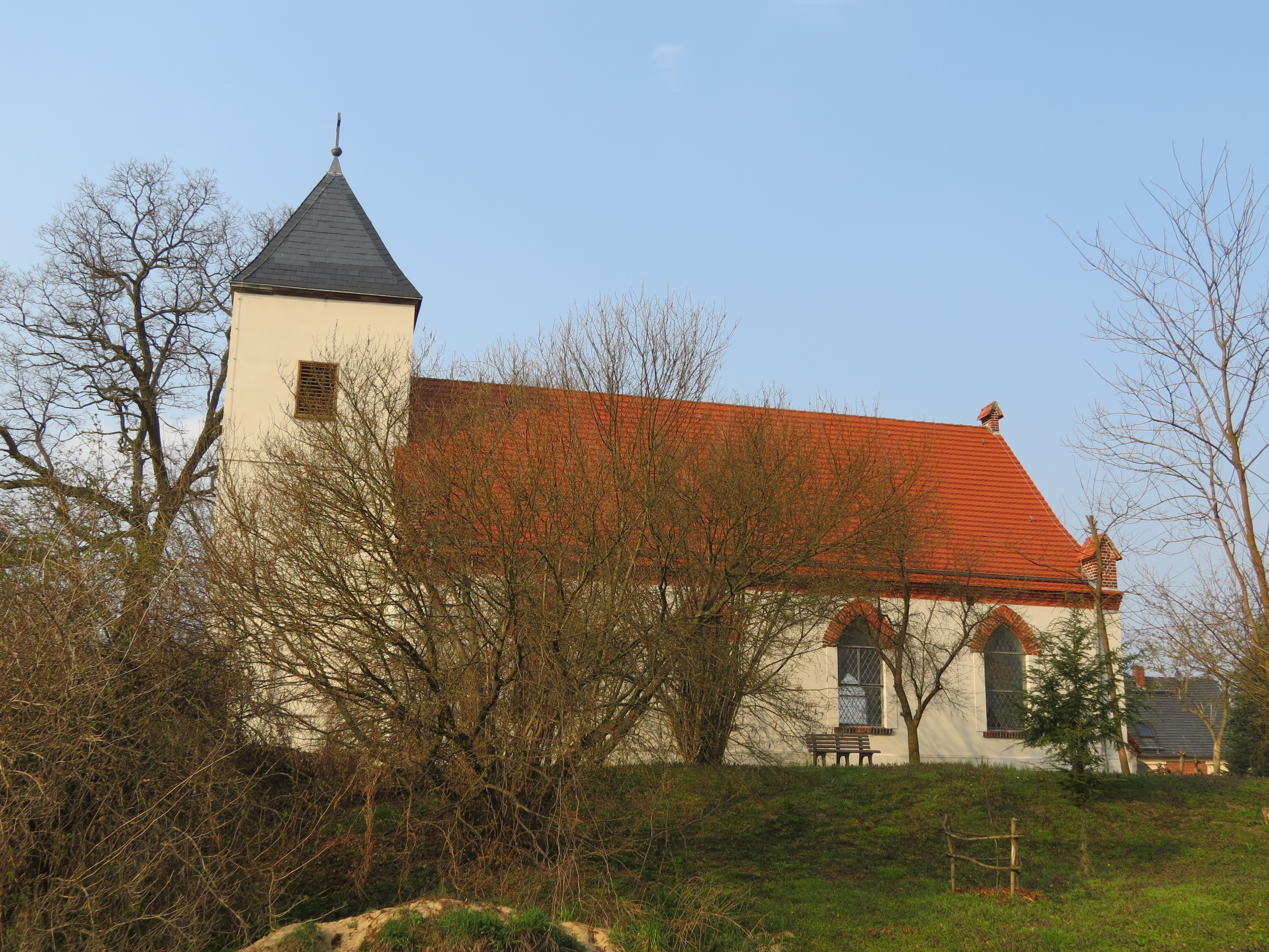 Dorfkirche Trebitz bei Lieberose Südseite, Trebitz, Ortsteil der Stadt Lieberose, Lkr. Dahme-Spreewald, Brandenburg, Deutschland